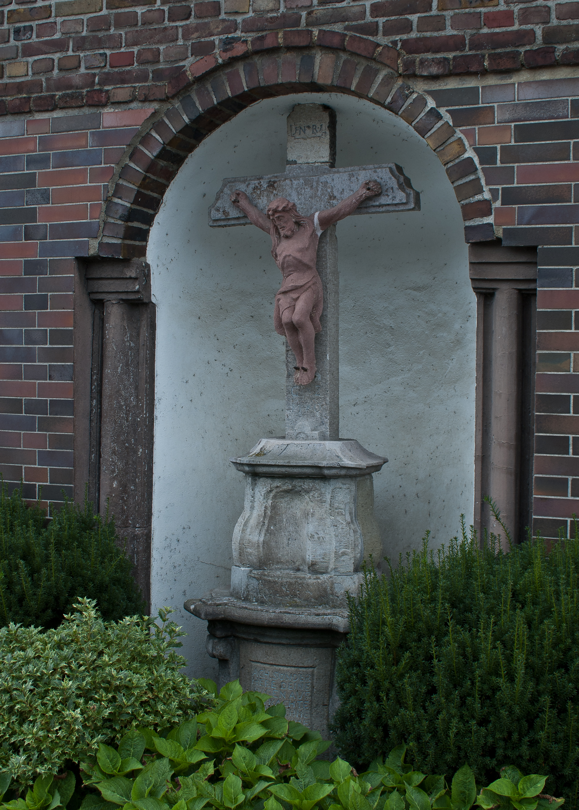 Barockes Kreuz in einer Nische am dem dem Josefshaus in Bergheim-Kenten gegenüber liegenden Haus.